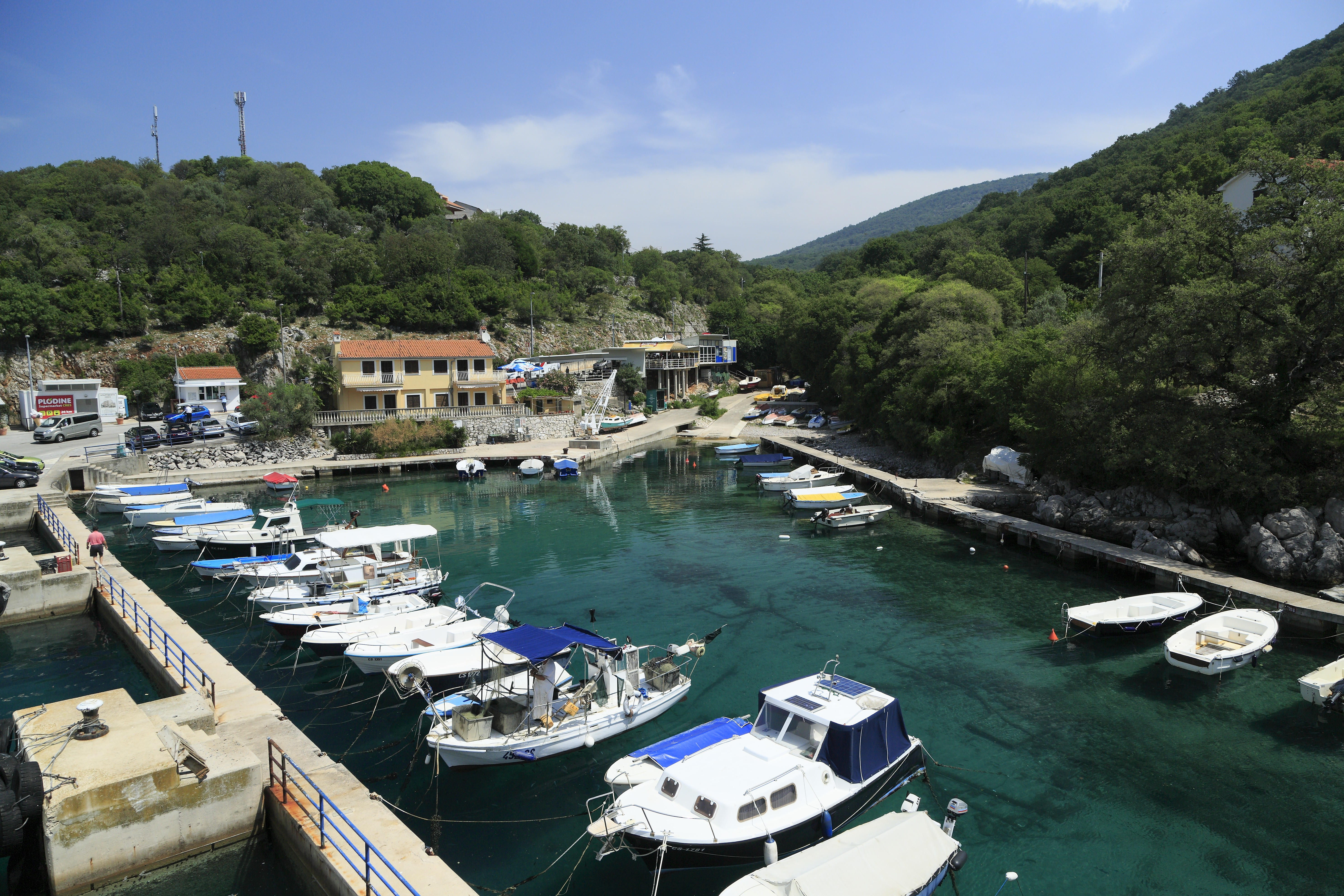 Hafenbecken für die Kleinschifffahrt unmittelbar neben dem Fähranleger, vom Fährschiff Bol.